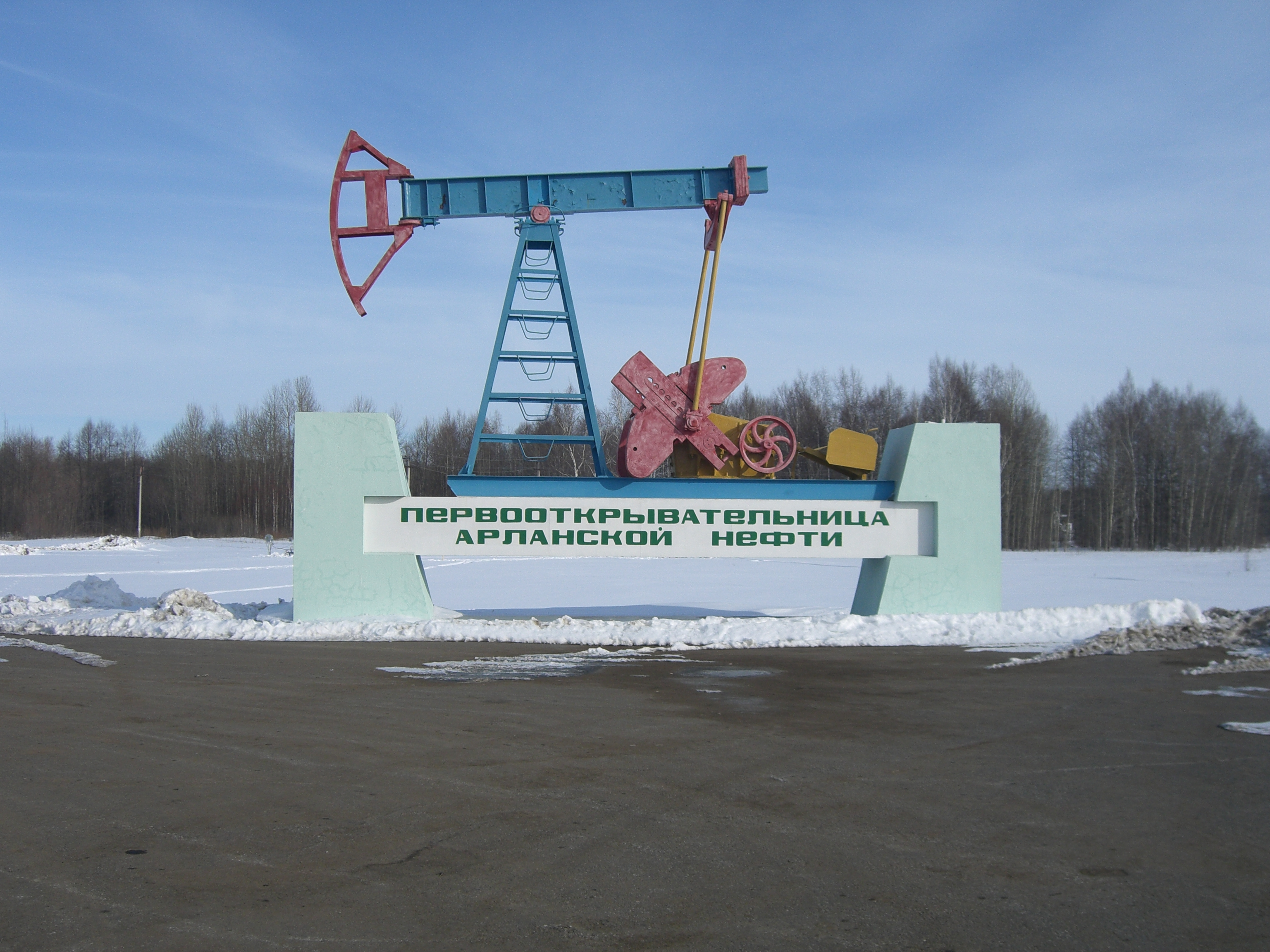 Монумент первооткрывательнице Арланской нефти скважине №3 вблизи деревни Ашит